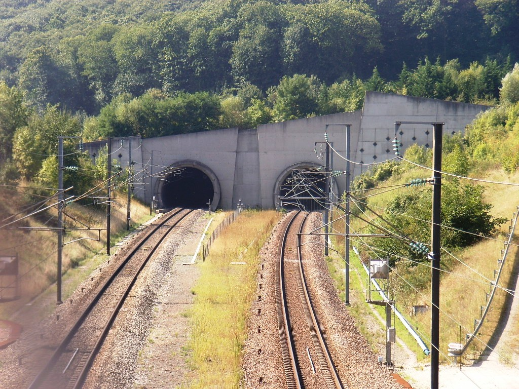 Entrée nord du tunnel sous Villejust (91) de la LGV Atlantique au niveau de Villiers, commune de Villebon-sur-Yvette